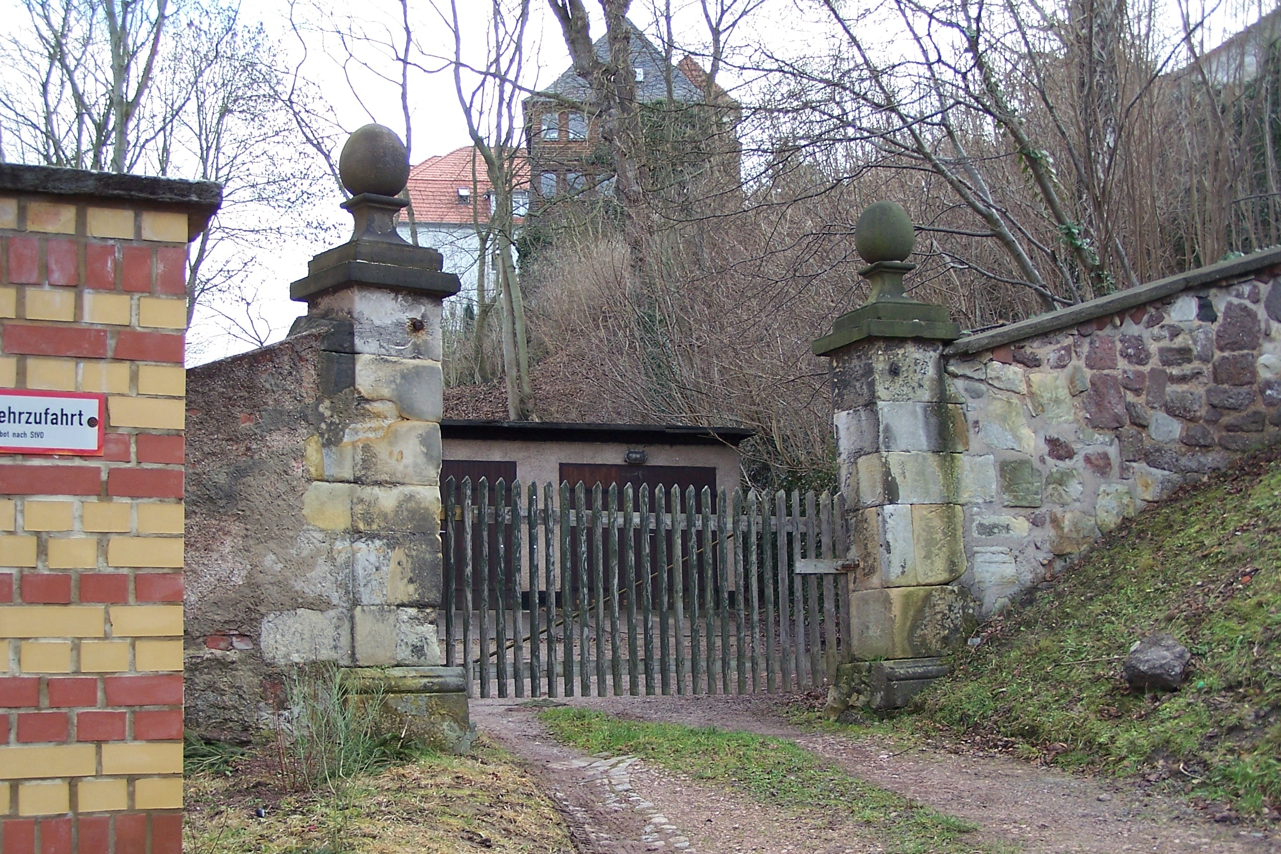 Die obere Gartenpforte am Pfarrberg ist ein letzter Bauteil des ehemaligen oberen Gartens an der Charlottenburg. Im Hintergrund ist der Glockenturm an der Stadtmauer erkennbar.